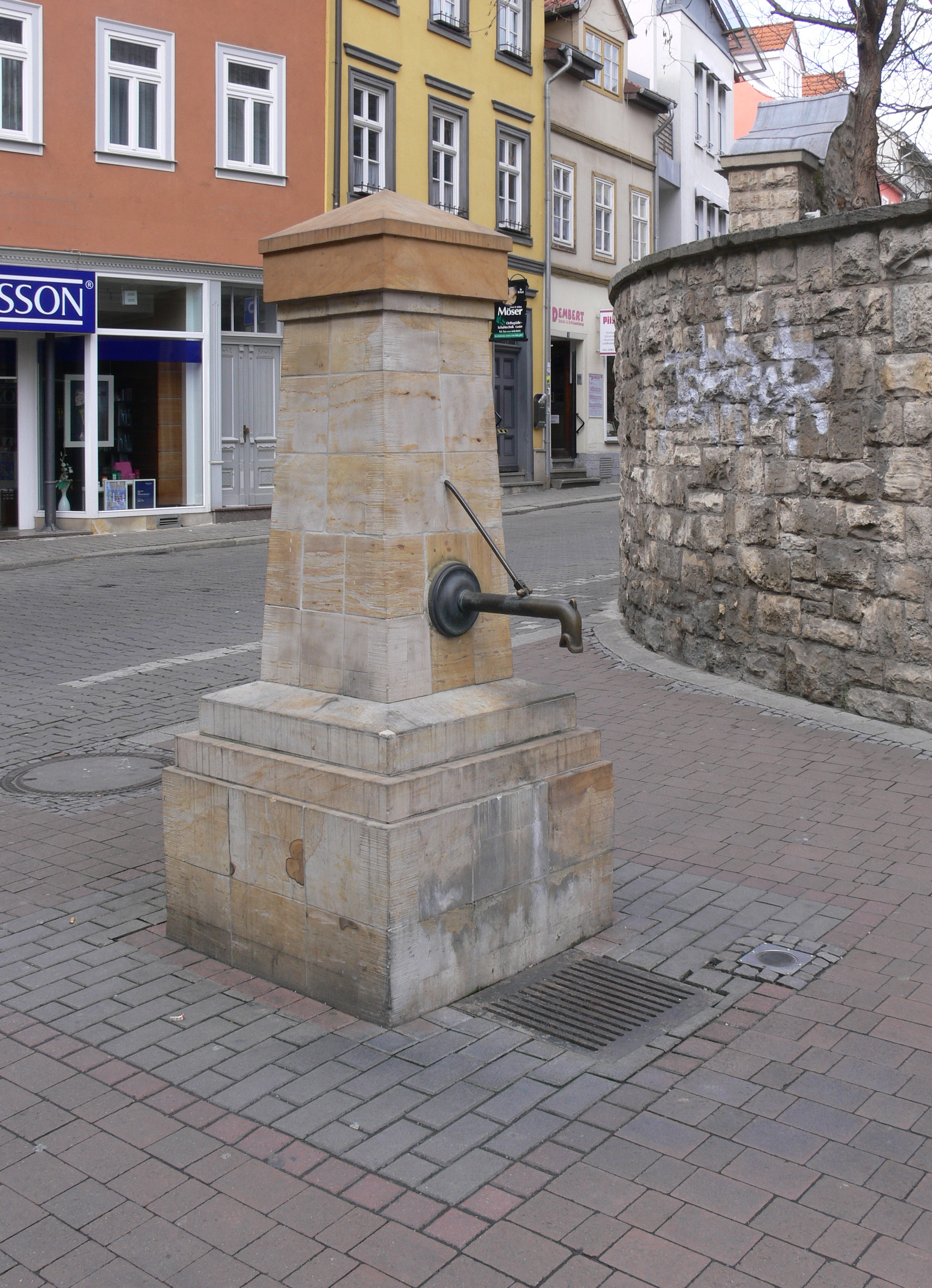 Erfurt, Brunnen vor der Lorenzkirche (Schlösserstraße)